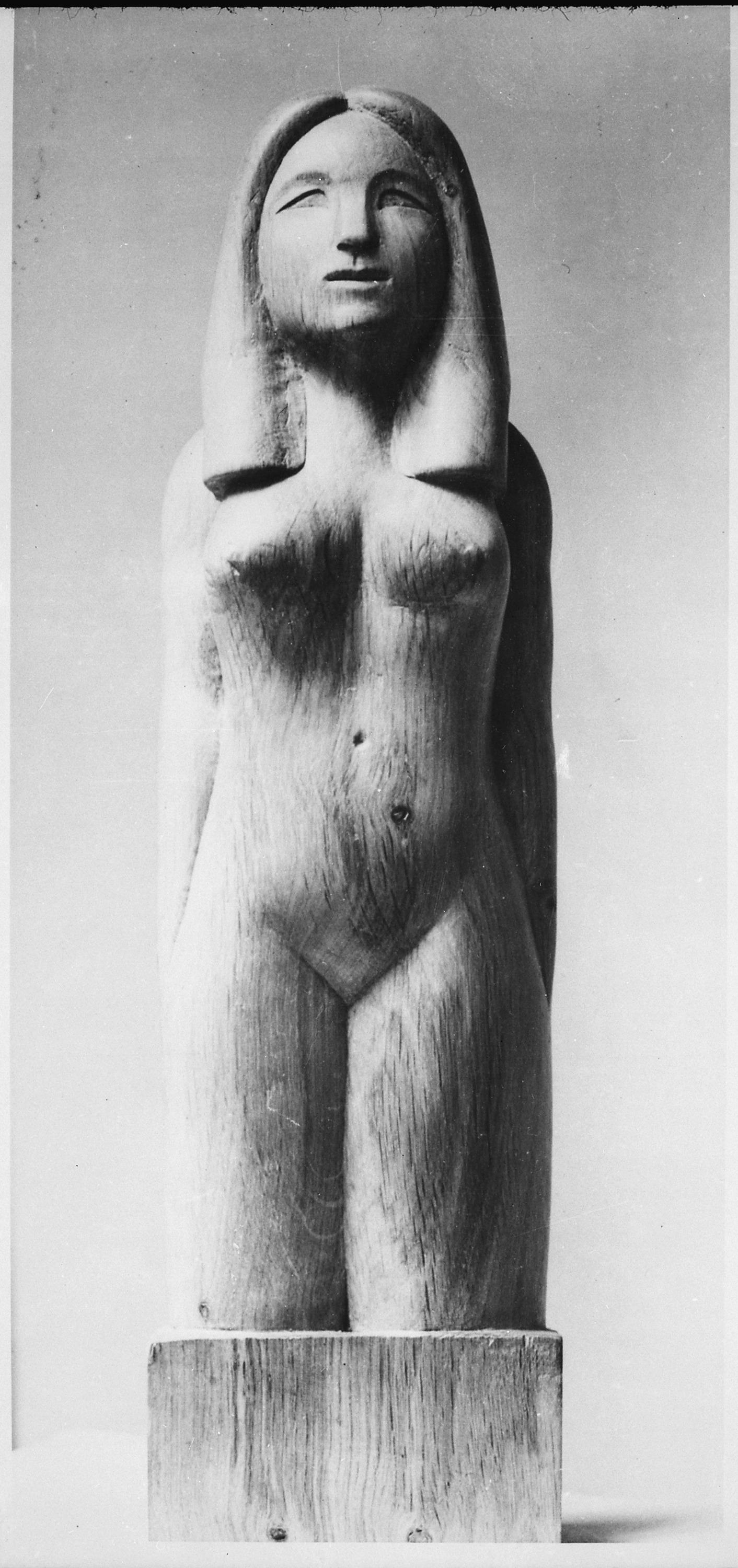 General notes: Sculpture.